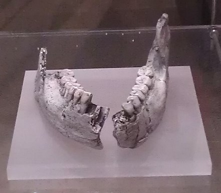 Fósil KNM-ER 992. Réplica en el Museo Nacional de Ciencias Naturales de Madrid.